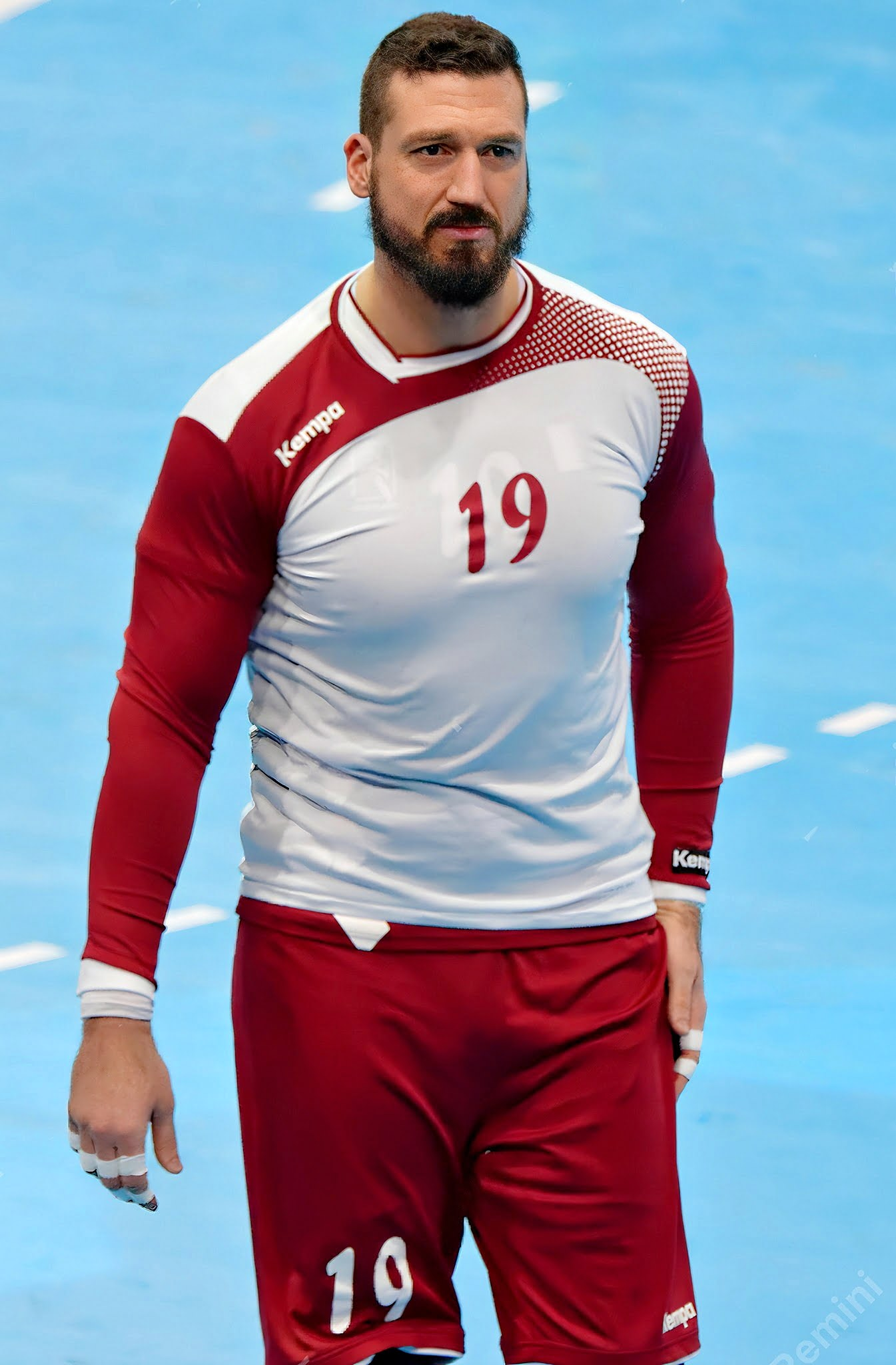 Borja Fernandez , le 10 janier 2016 lors du match Norège / Qatar durant la Golden League à l'AccordHotel Arena (Paris).